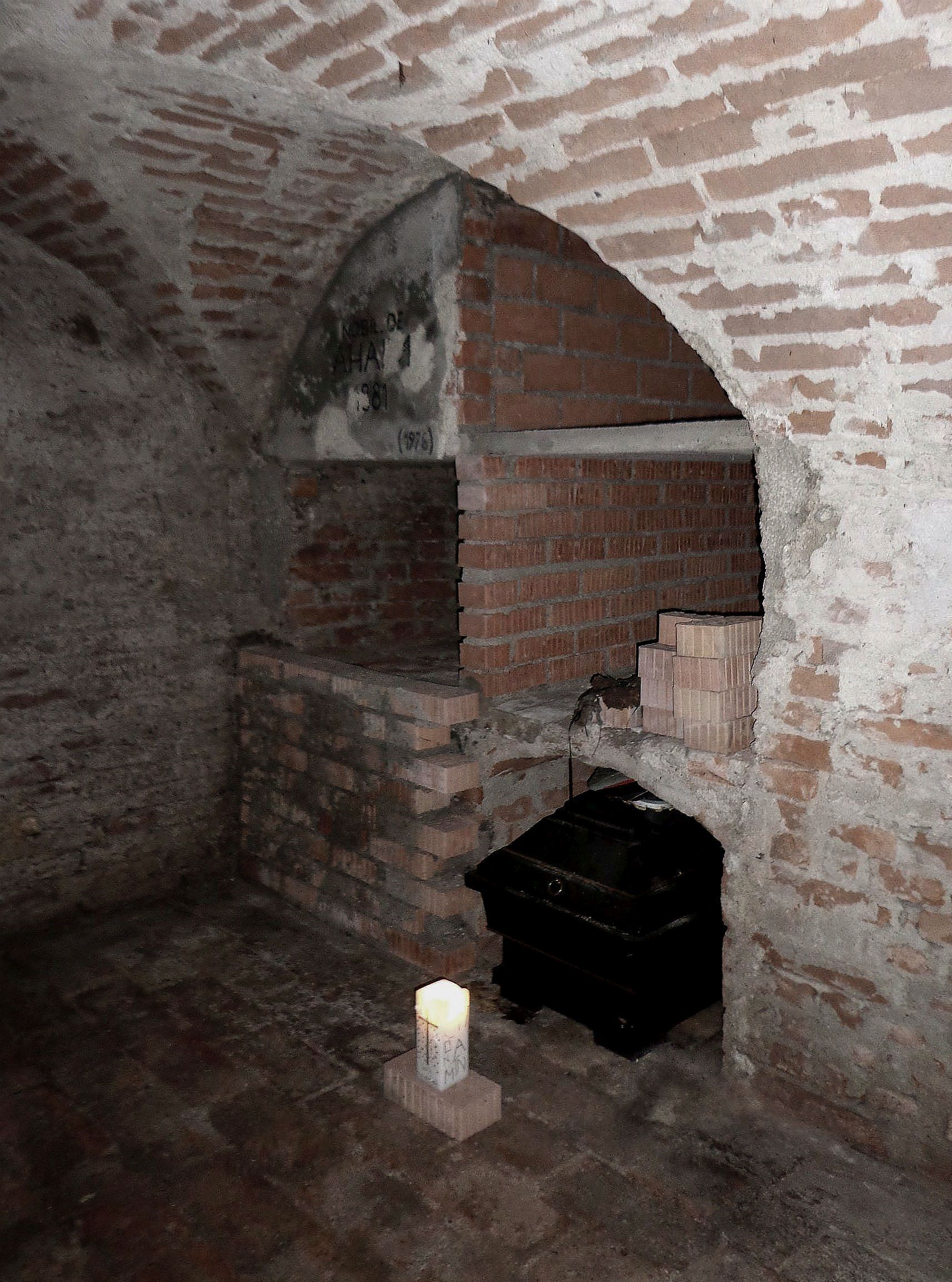 Prälatengruft/Pröpstegruft in der Stiftskirche Reichersberg: oben links Überreste der Grafen von Aham, unten links Propst Odulf Danecker, unten rechts Propst Werner Thanecker.